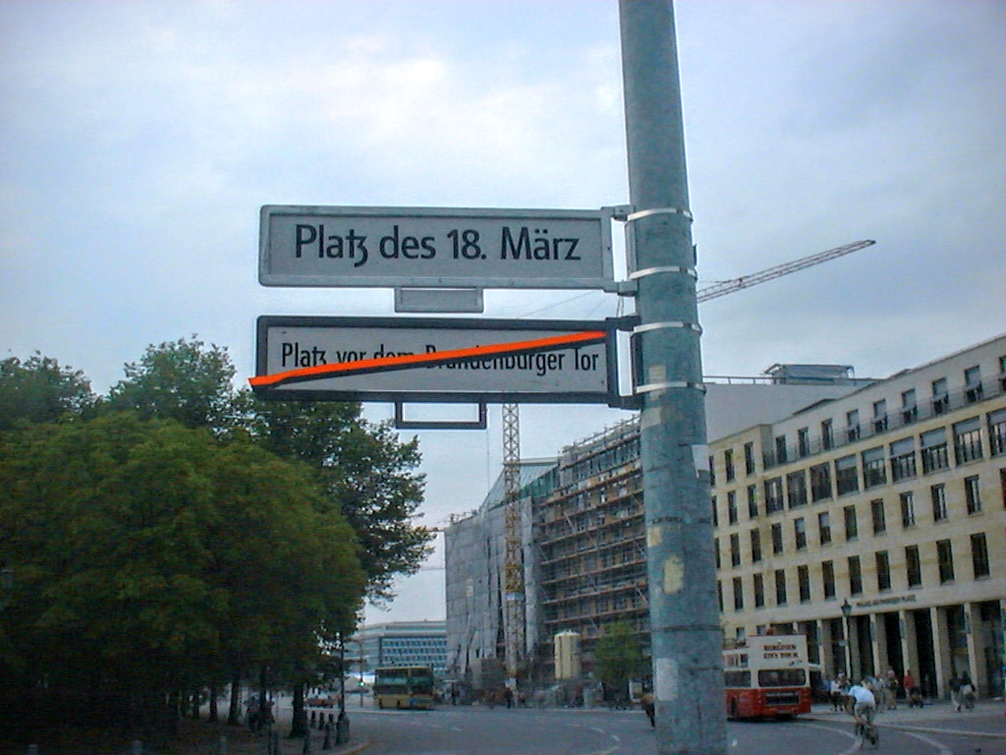 Straßenschild "Platz des 18. März" und ungültig gemachtes Straßenschild "Platz vor dem Brandenburger Tor"